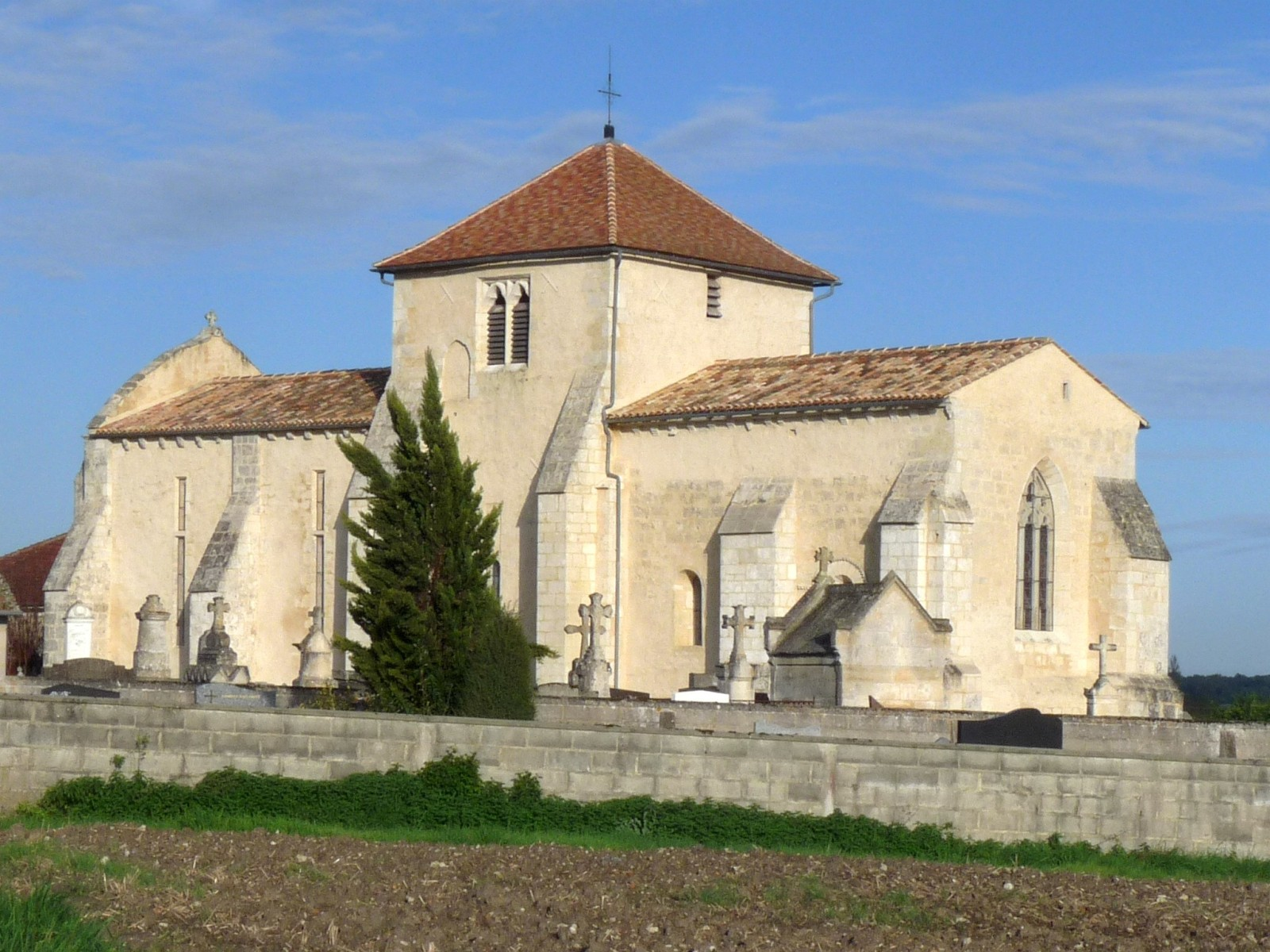 Eglise de Mérignac, Charente-Maritime, France